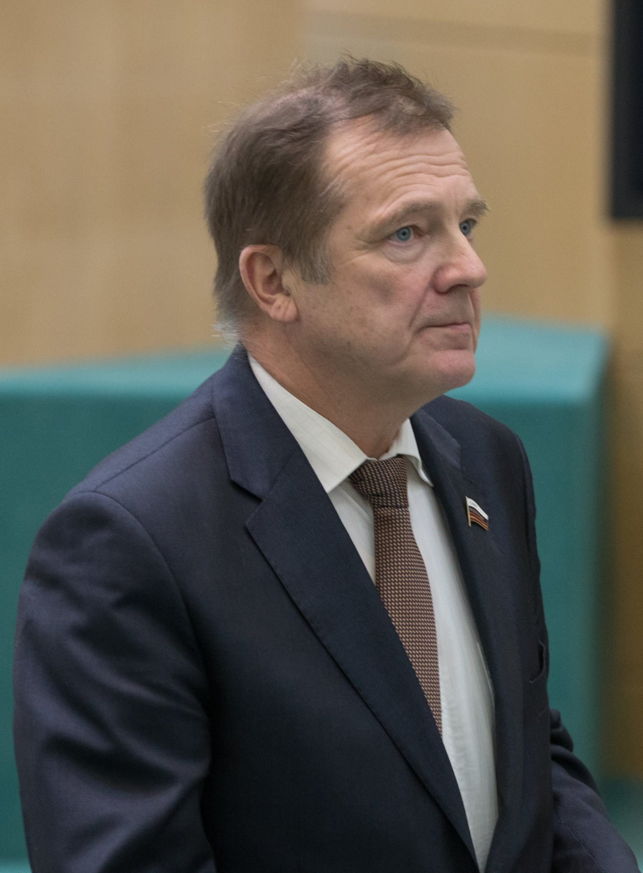 Катанандов, Сергей Леонидович